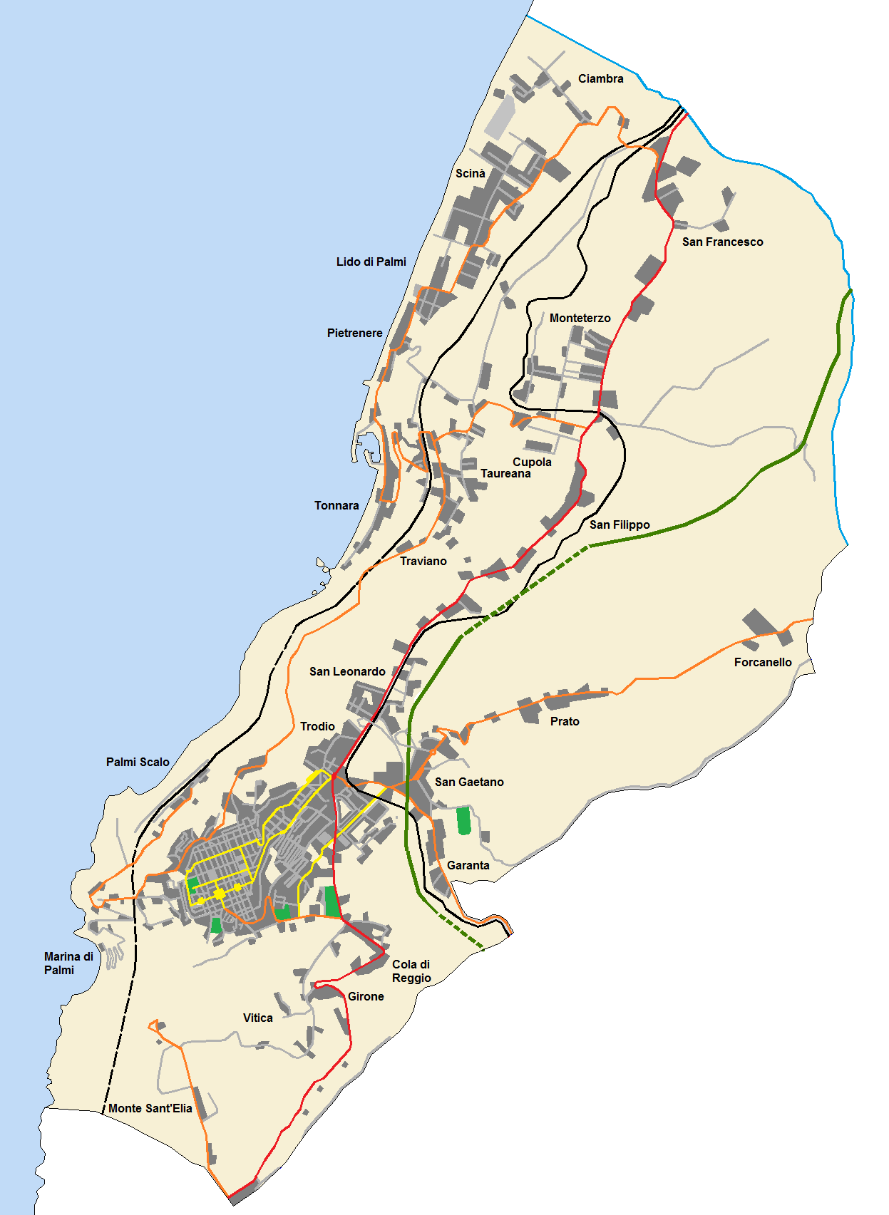 Cartografia del Comune di Palmi